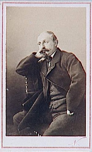 Portrait du peintre Henri Durand-Brager (1814-1879)